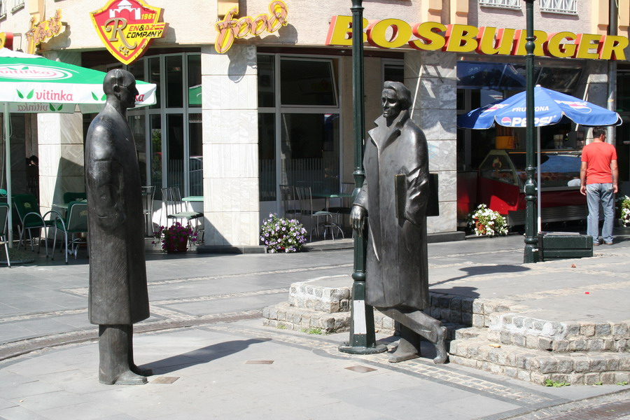 Tuzla